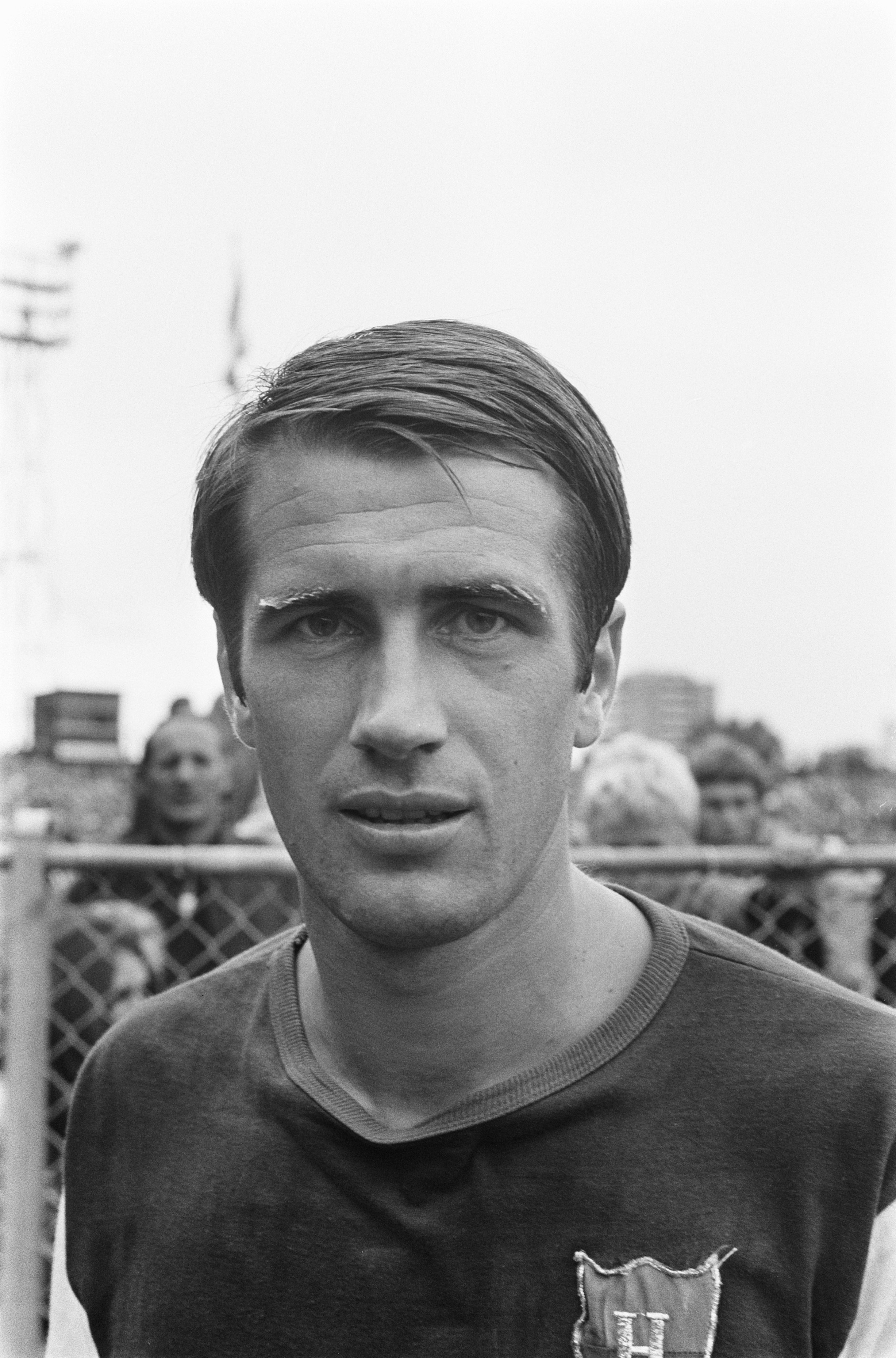 Collectie / Archief : Fotocollectie Anefo Reportage / Serie : [ onbekend ] Beschrijving : Haarlem tegen Go Ahead 1-1, Couperus (Wietze) (Haarlem), kop Datum : 31 augustus 1969 Locatie : Haarlem Trefwoorden : sport, voetbal Persoonsnaam : Couperus, Louis Fotograaf : Mieremet, Rob / Anefo Auteursrechthebbende : Nationaal Archief Materiaalsoort : Negatief (zwart/wit) Nummer archiefinventaris : bekijk toegang 2.24.01.05 Bestanddeelnummer : 922-7471